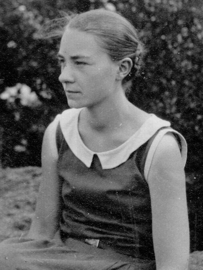 Mathematikerin Dr. Ingeborg Seynsche, spätere Ehefrau von Friedrich Hund